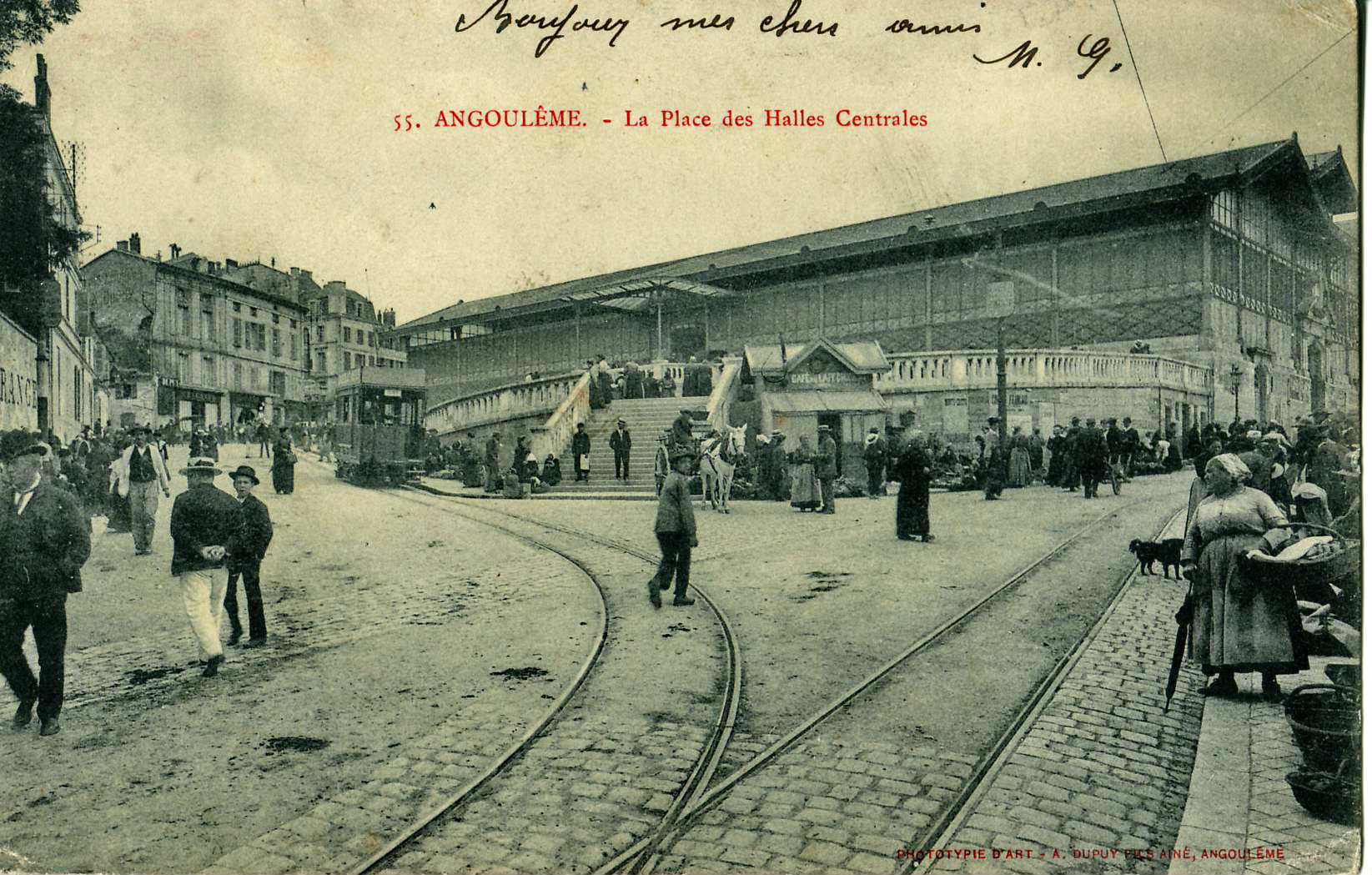 Carte postale ancienne éditée par Dupuy-Pills ainé à Angoulème, n°55 Angoulême : La place des Halles centrales Vue en moyen plan d'une rame de tramway.